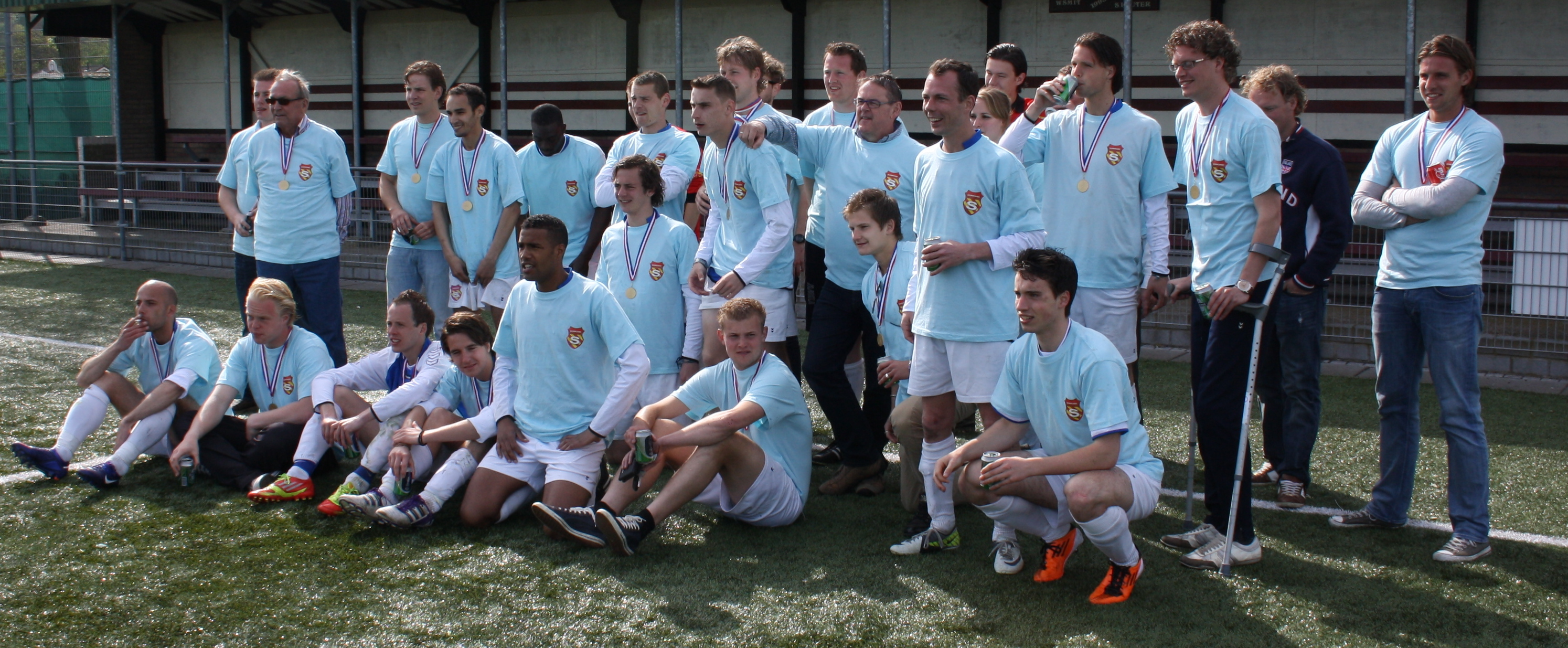 Foto bij kampioenschap Duinrand S in 2012